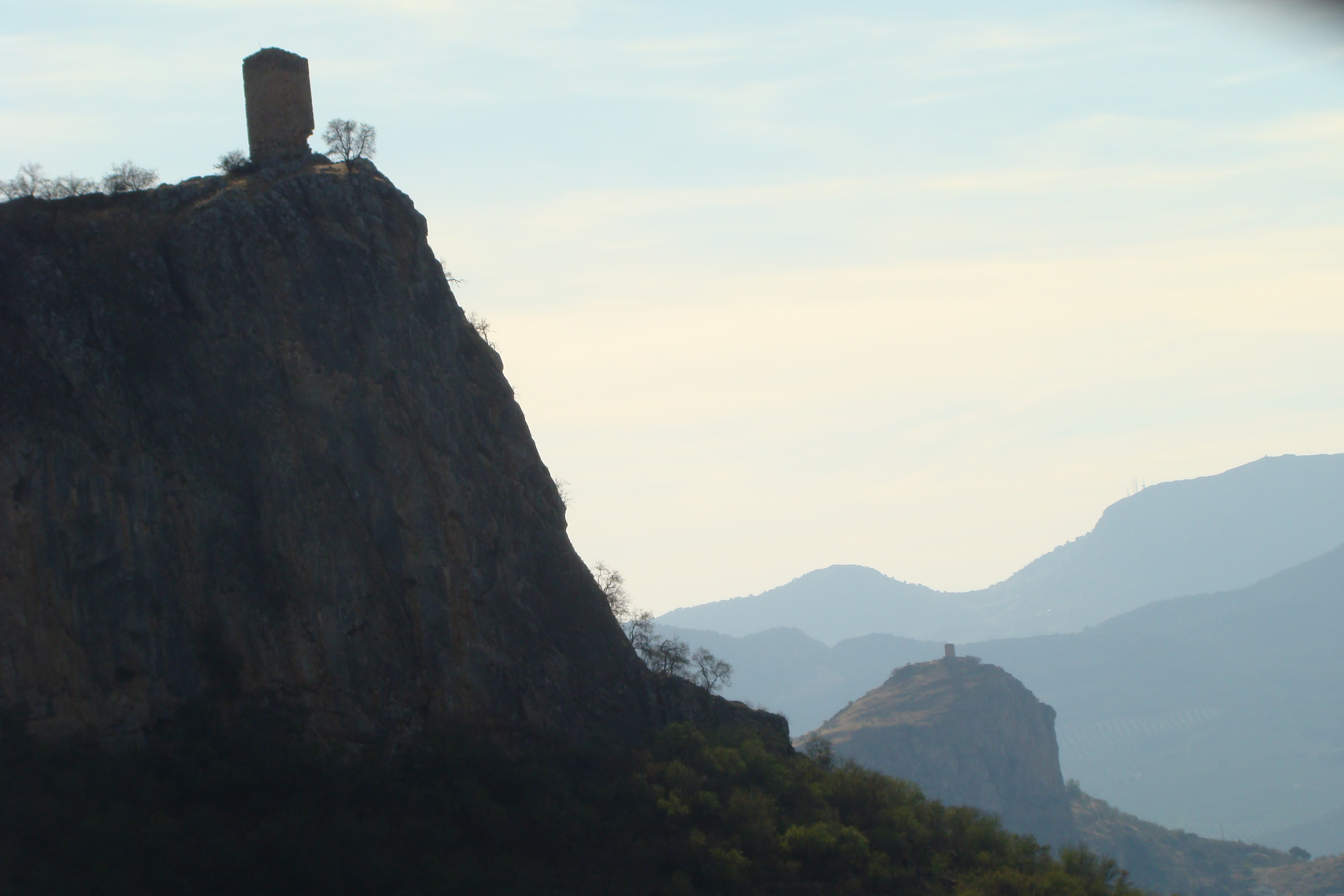 Vista de la atalaya de Mingoandrés, en Moclín